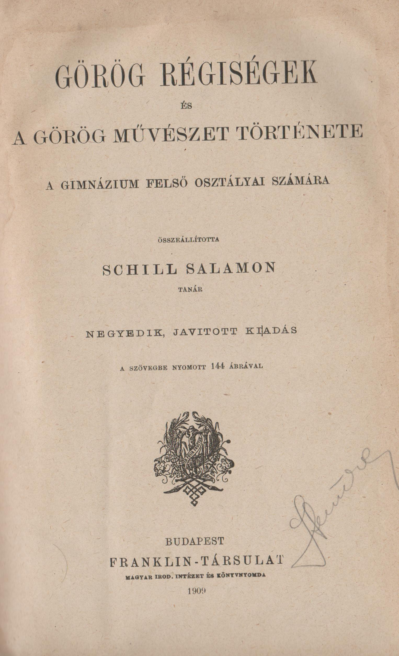 Az adott mű címlapja.